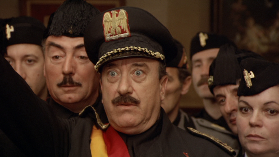 scena dal film Il piatto piange